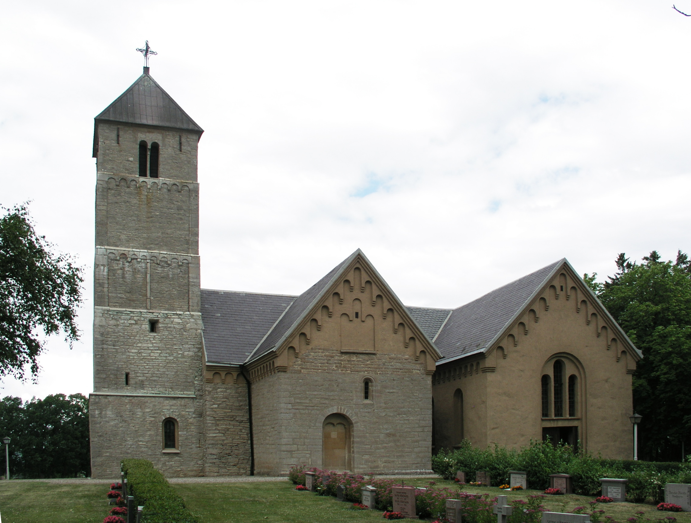 Heda kyrka, Diocese of Linköping, Ödeshögs kommun.